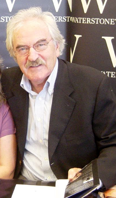 Des Lynam